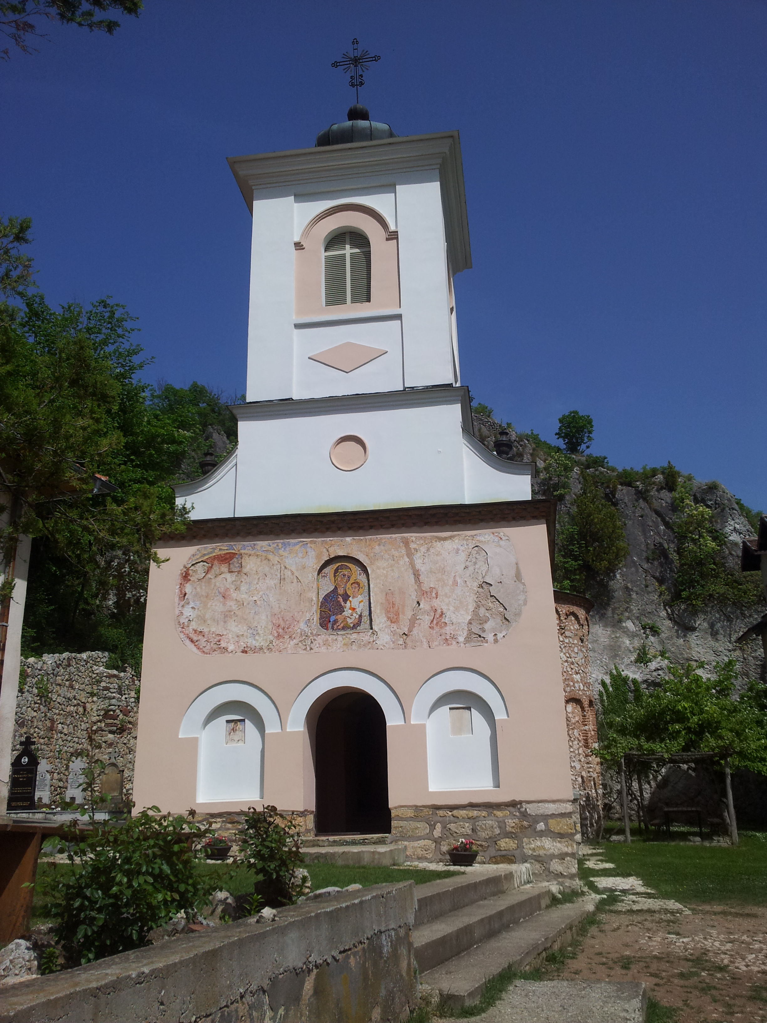 Manastir Vitovnica - spolja